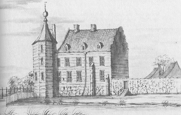 Kemnade